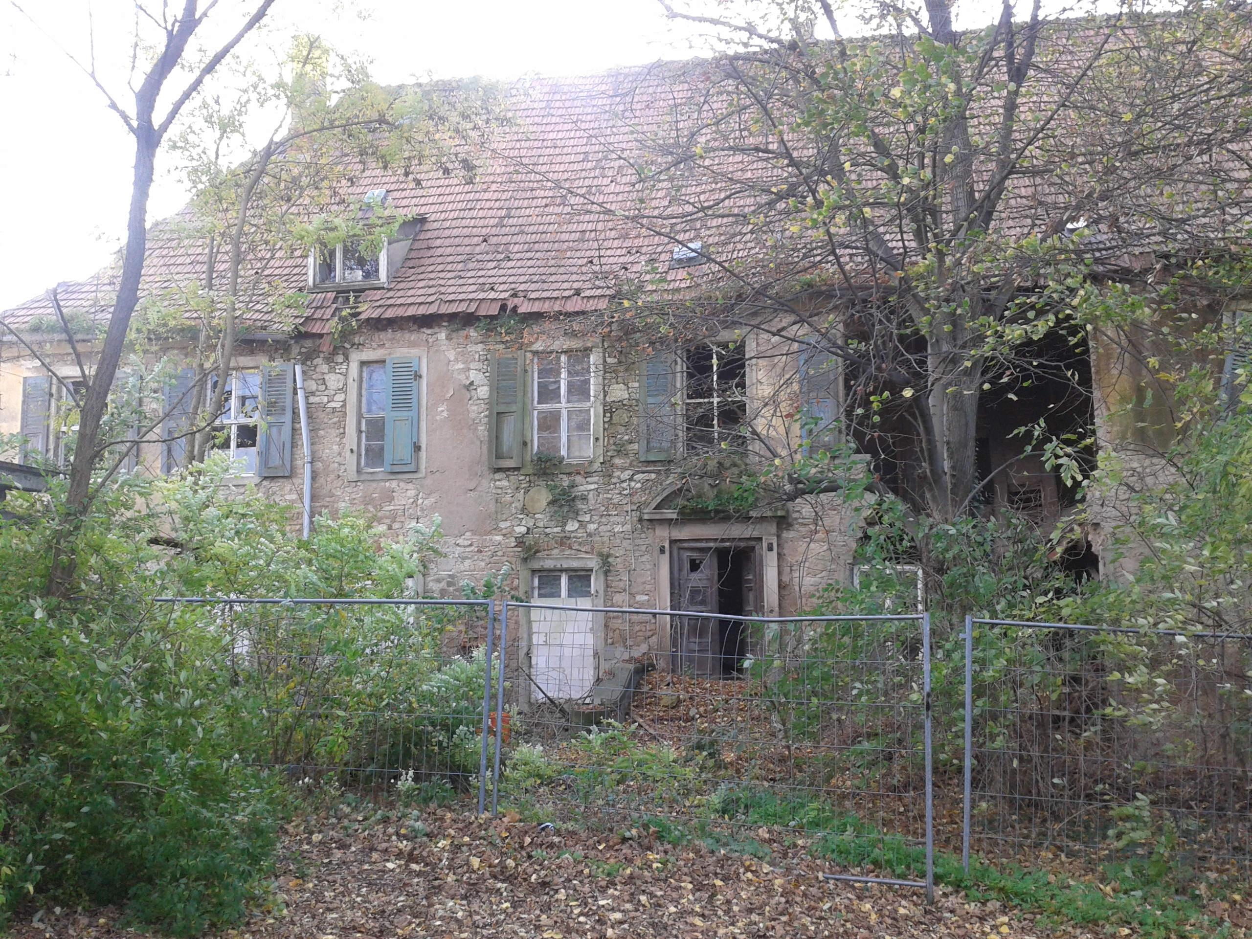 Stark verfallene Haupteingang der Würdenburg